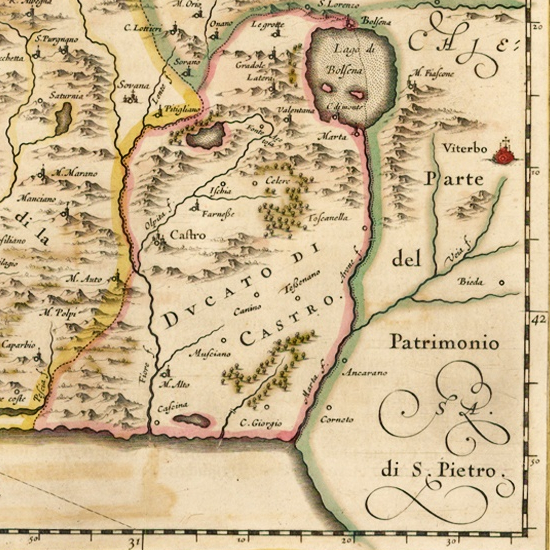 Il Ducato di Castro in una mappa del 1640